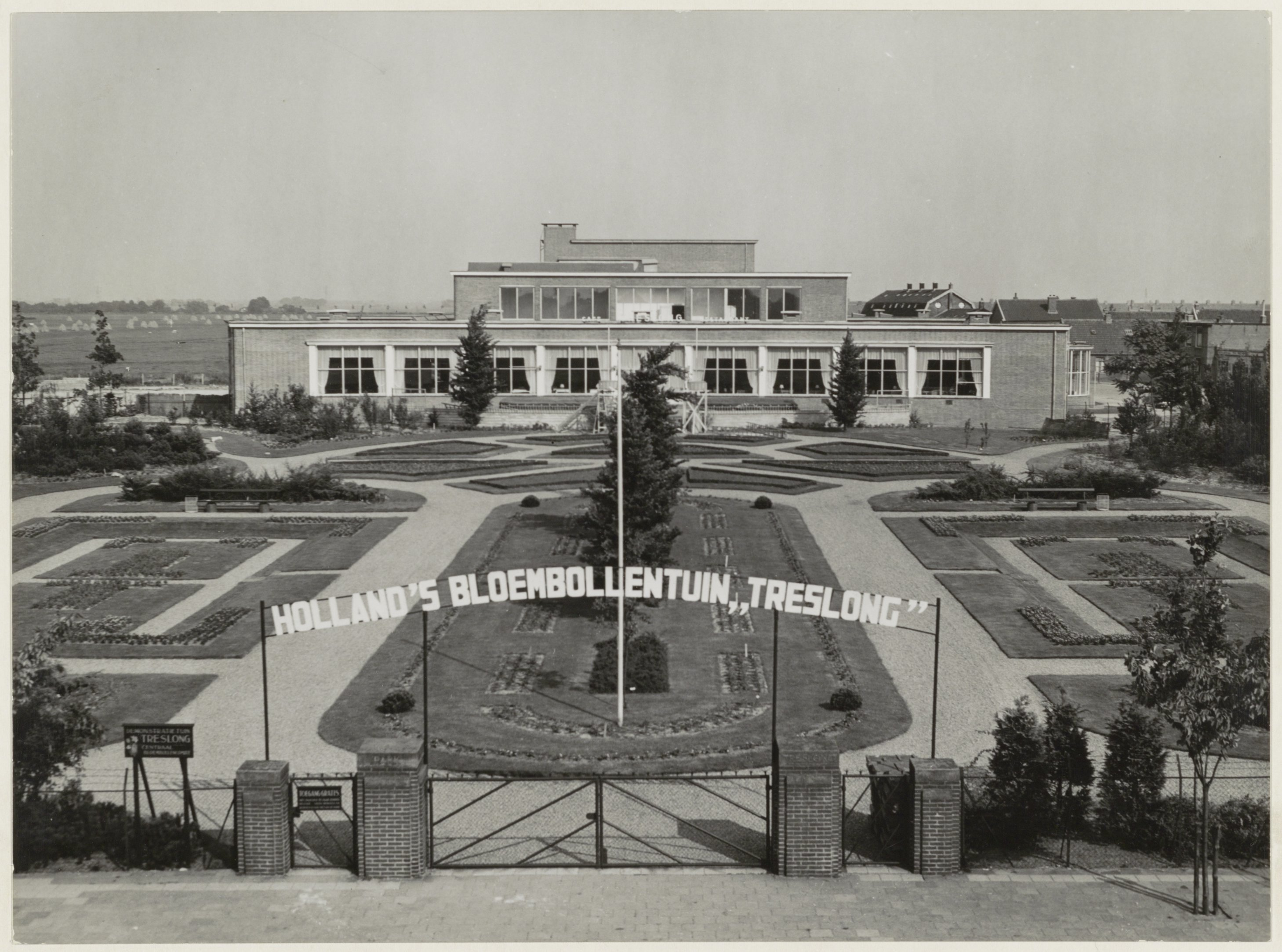 Het gebouwencomplex Treslong, bestaande uit een restaurant met concertzaal, en een kantoorruimten, in zijn geheel gebruikt door de bollenbedrijven, hier werden bollen verhandeld. In de jaren zestig traden regelmatig bekende bands op. Treslong werd vooral bekend door het optreden van The Beatles op 5 juni 1964.